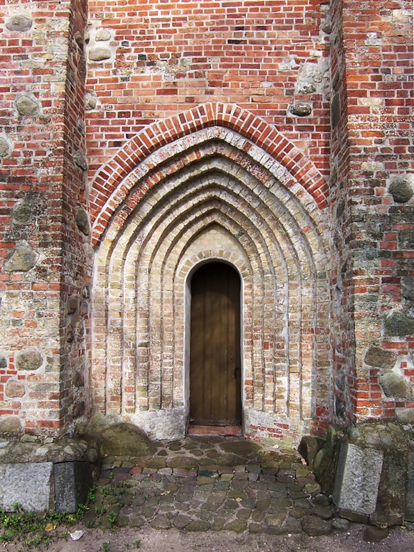 Kirchenportal in Thulendorf